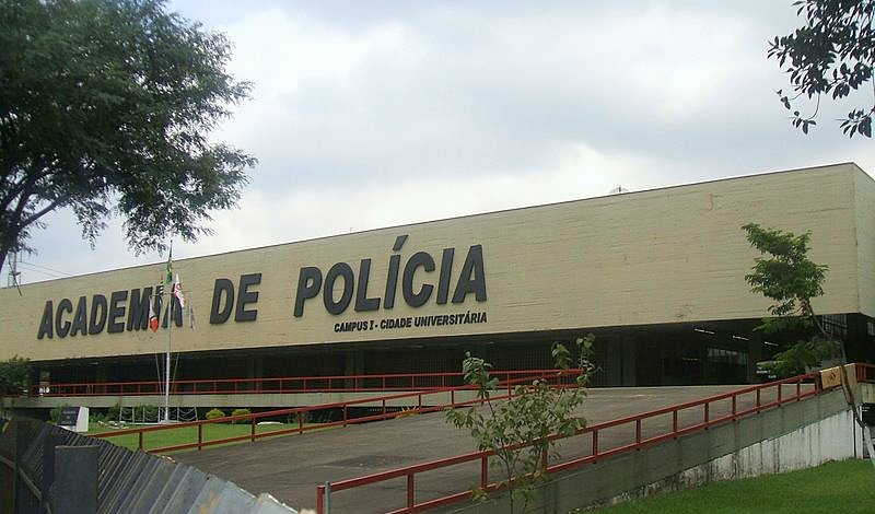 Campus I da Academia de Polícia de São Paulo, junto à Cidade Universitária da USP. São Paulo, Brasil.